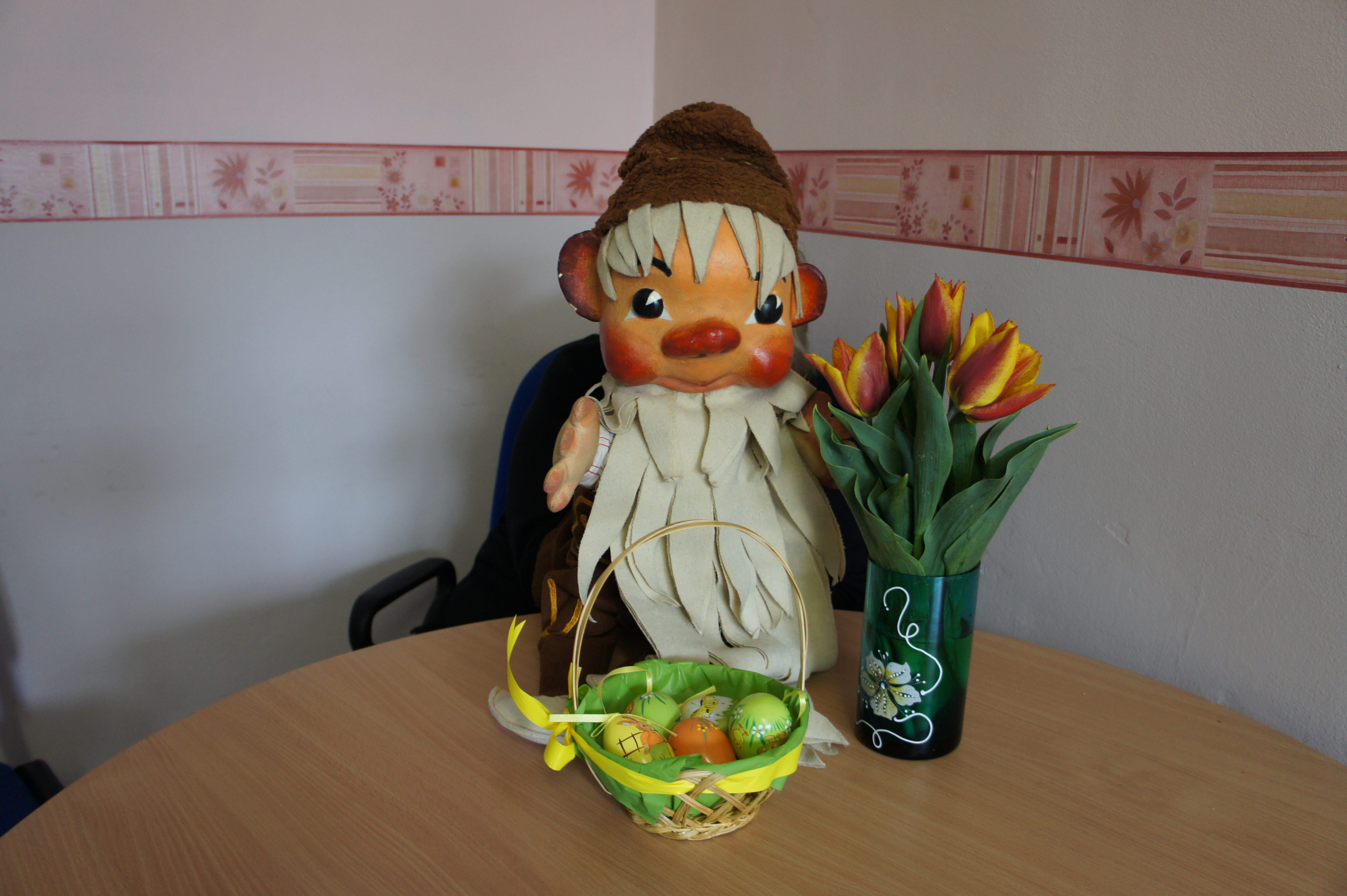 Педя човек